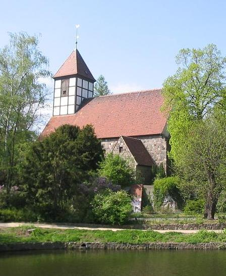 Dorfkirche Tempelhof (Berlin)